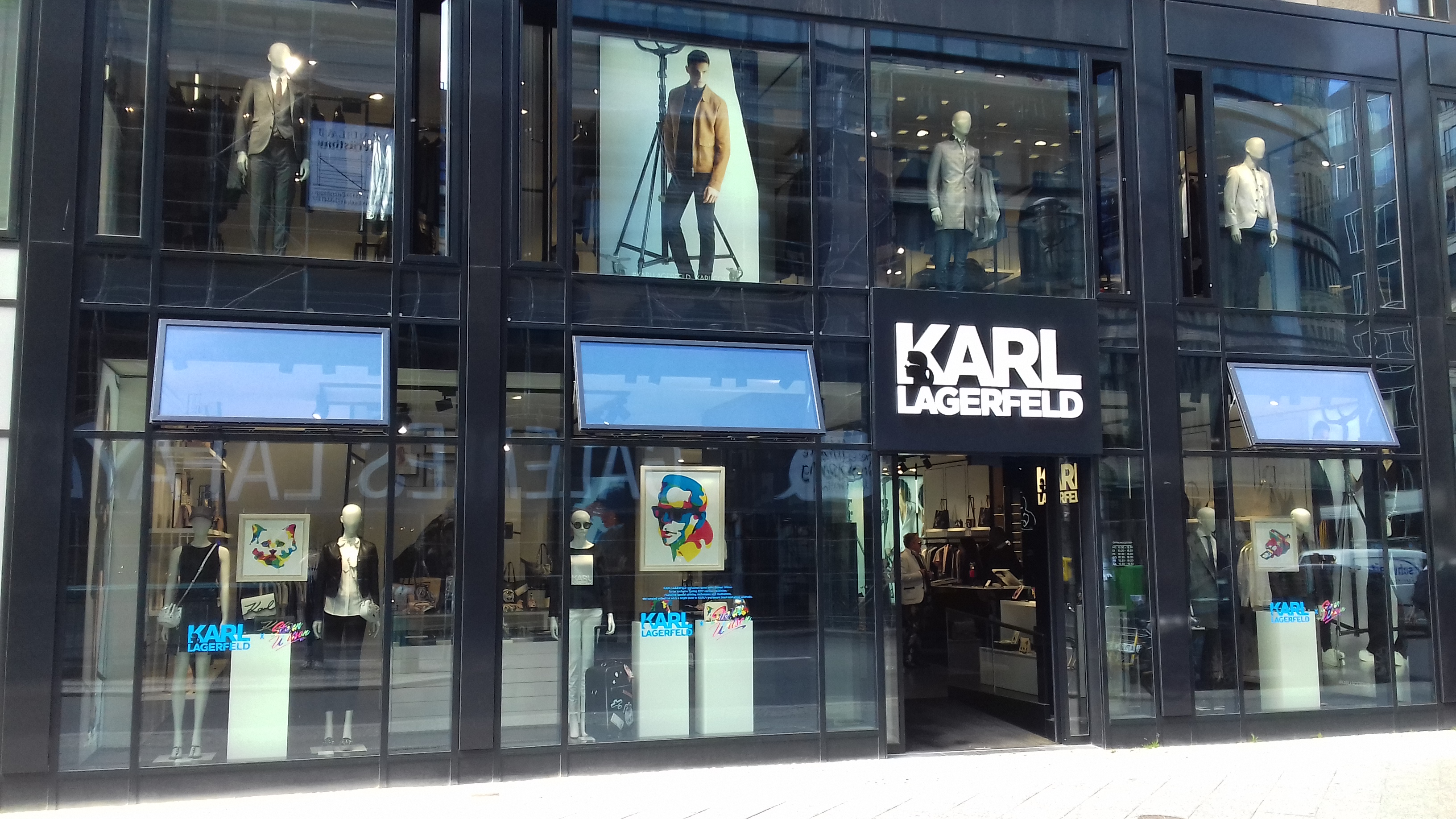 Karl Lagerfeld shop in Berlin, Germany